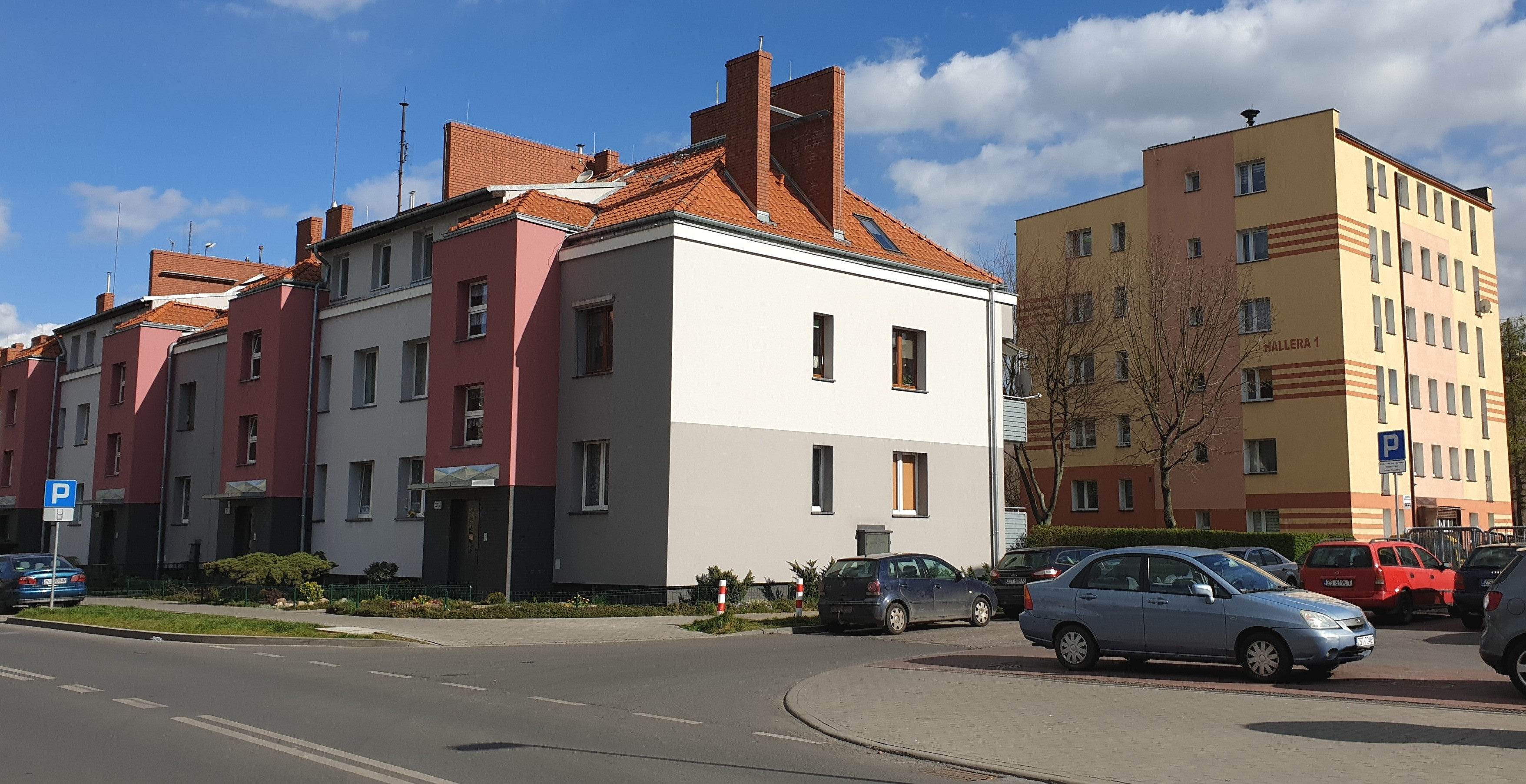 Stargard. Osiedle Hallera, blok nr 1